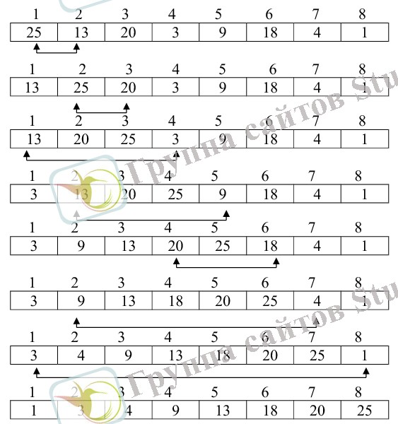 Қазақша (кирил): Енгізу арқылы сұрыптау